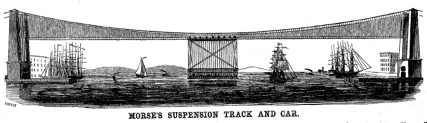 Morseren zubi eskegia, New Yorken proiektatua.